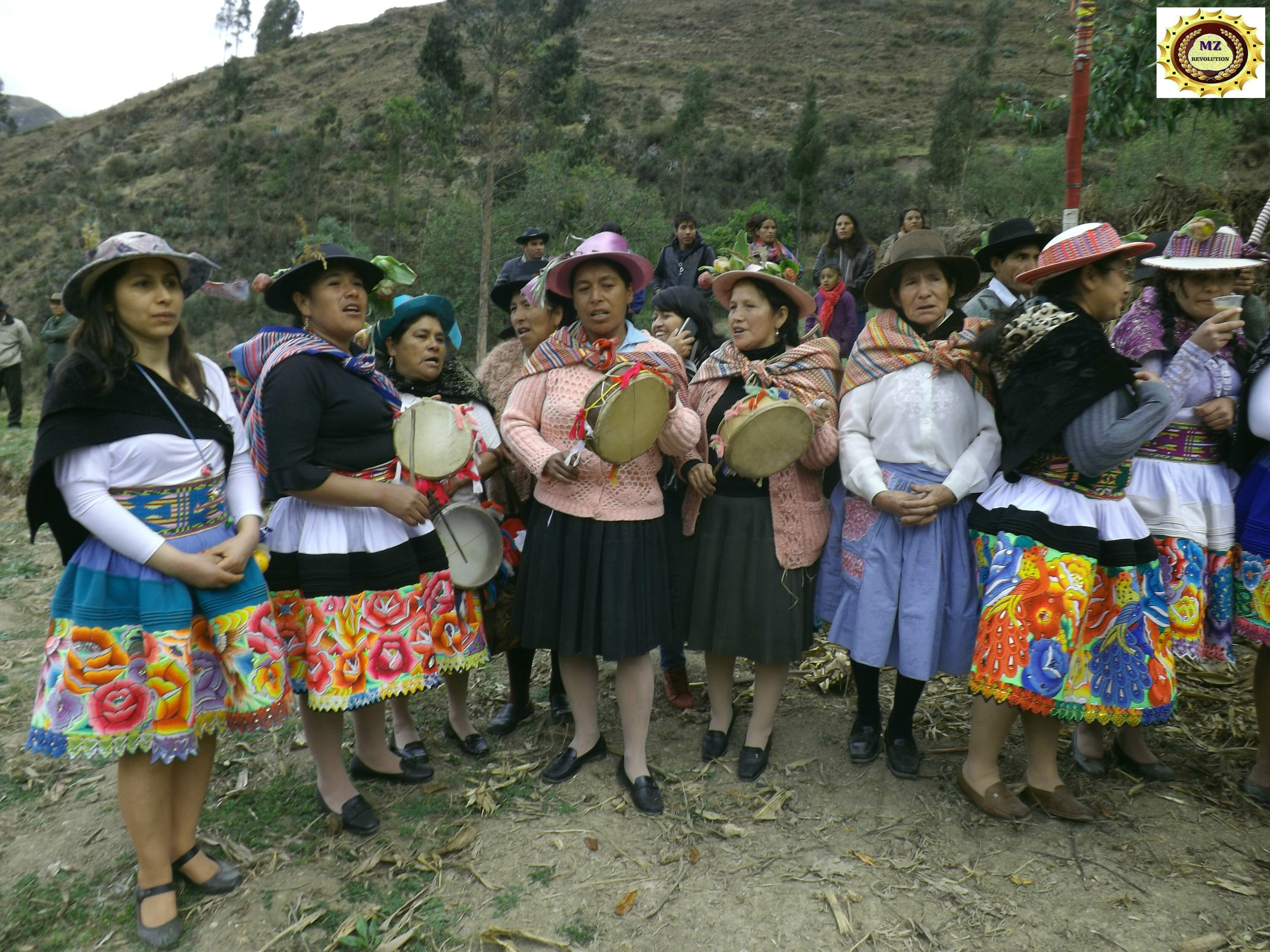 Es la mejor fiesta de toda la región